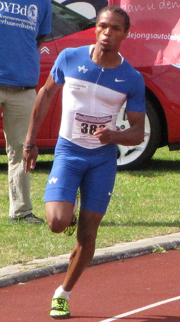 Gouden Spike Meeting 2011, 200 Meter, 4. Lauf: Robin Erewa